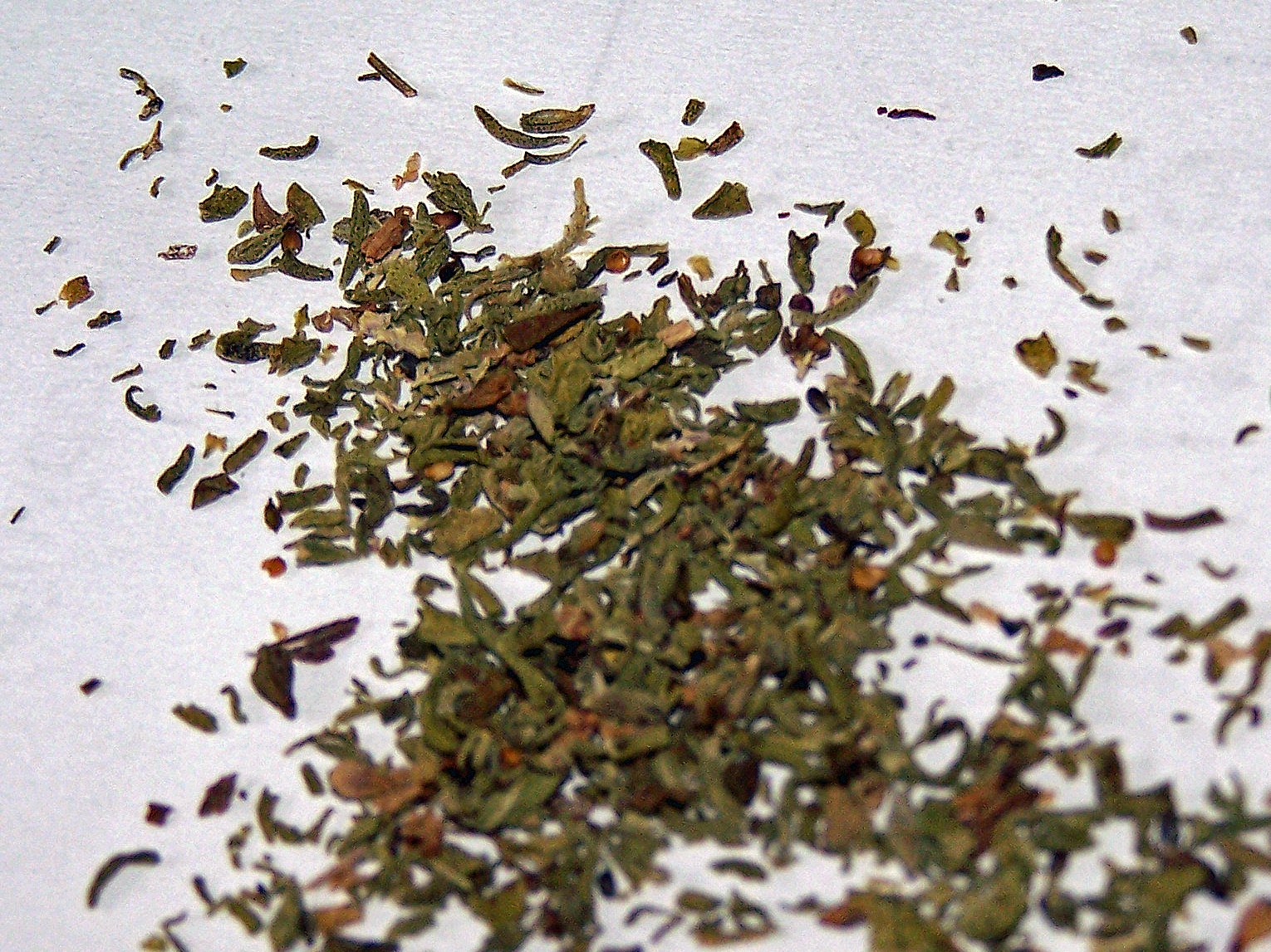 Satureja hortensis Bonenkruid sarriette Bohnenkraut